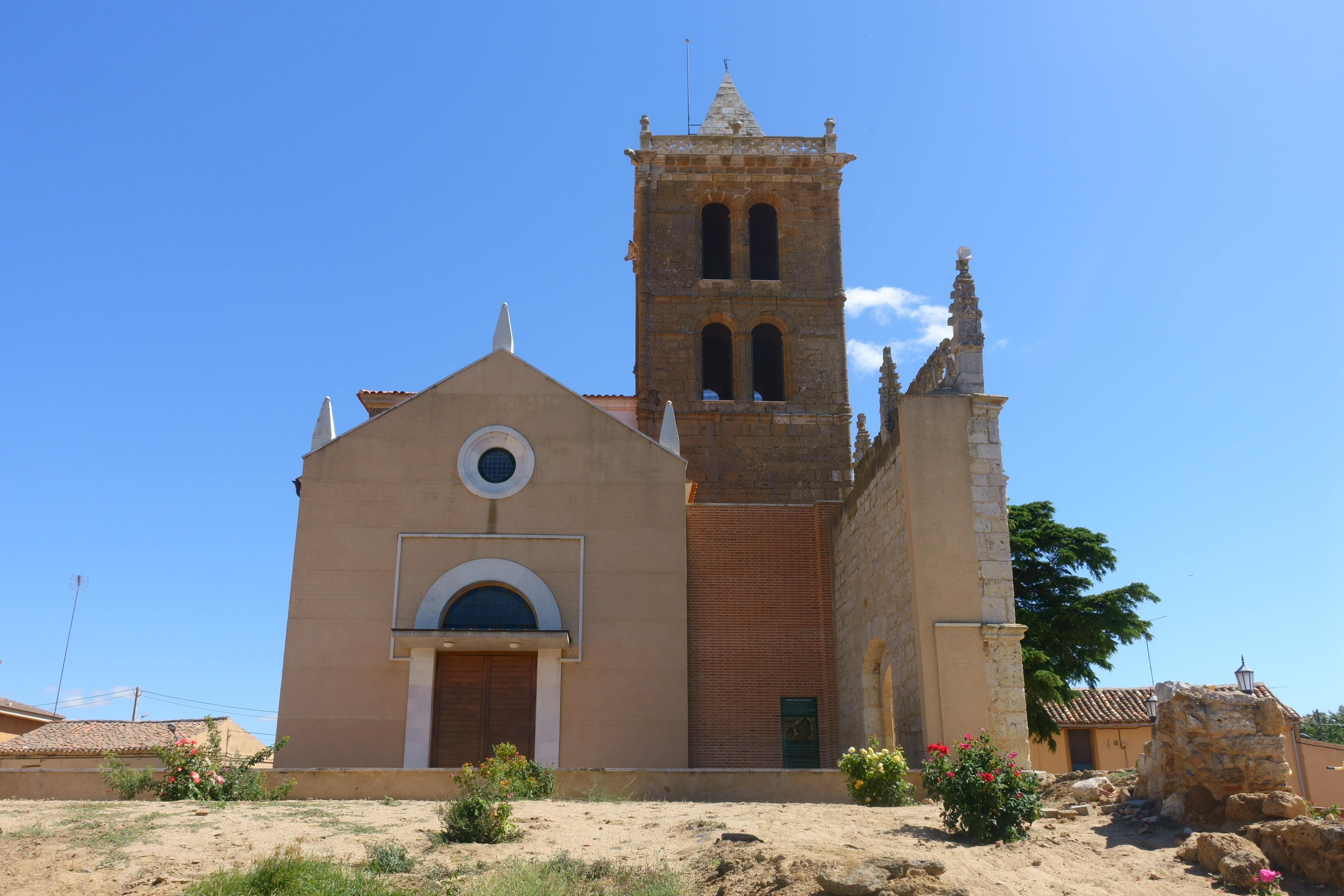 Iglesia de San Vicente, Villar de Fallaves (Zamora, España).